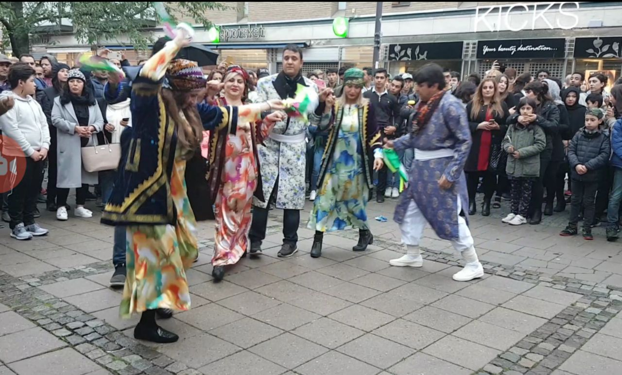 Čupi dance is the most popular Lurish dance style among Feyli Lurs